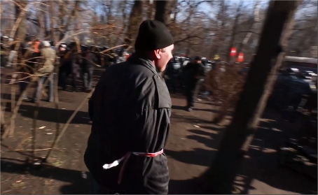 Київ, Маріїнський парк, 18 лютого 2014. Представник тітушок із розпізнавальною біло-червоною пов'язкою (упізнаний як Савойський Олексій Іванович (28.11.1978 р.н. - 11.07.2020 р.с.), уродженець с. Довгалівка, Талалаївського району Чернігівської області).